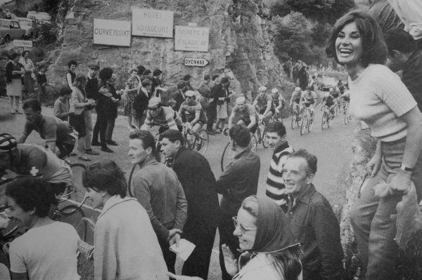 Le Prix de l'Amitié (futur tour de l'Ain cycliste) : la montée de Corveissiat